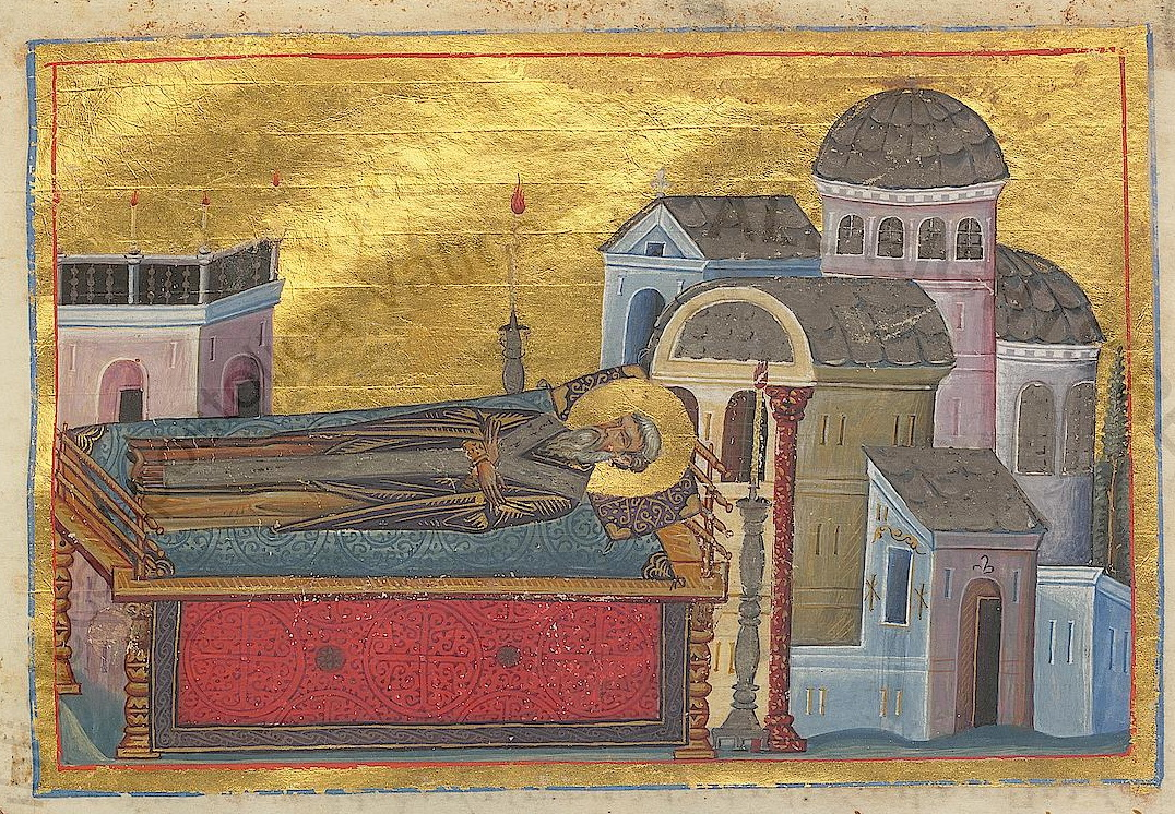 Святитель Прокл, архиепископ Константинопольский Константинополь. 985 г. Миниатюра Минология Василия II. Ватиканская библиотека. Рим.